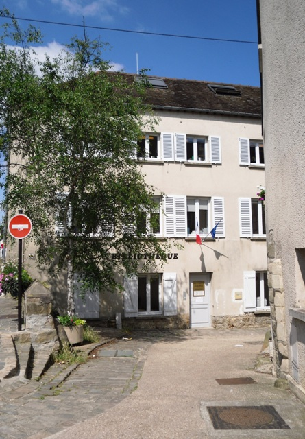 La bibliothèque municipale de Bièvres (91)